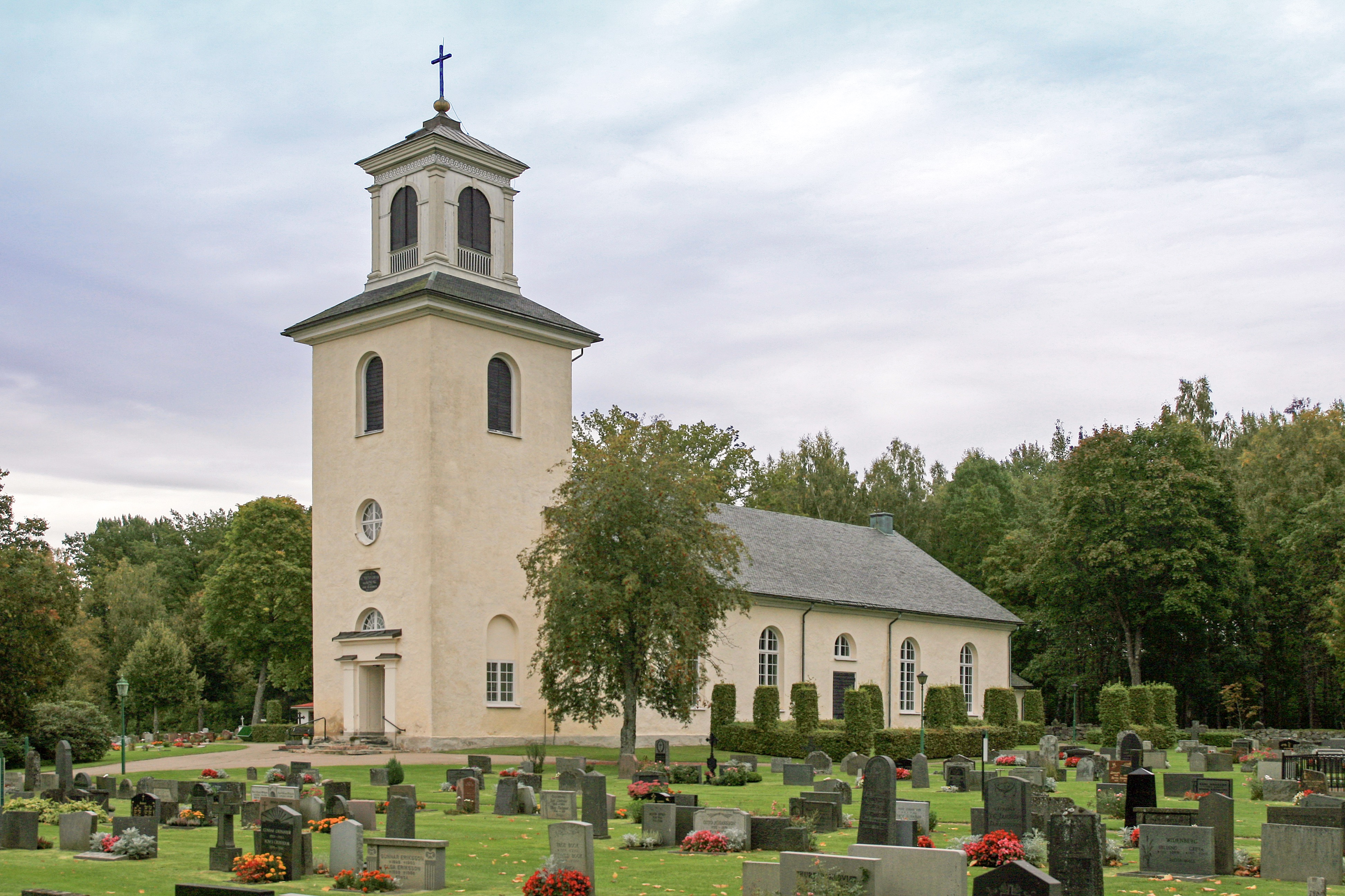 Kirche in Södra Sandsjö, Tingsryds Kommun